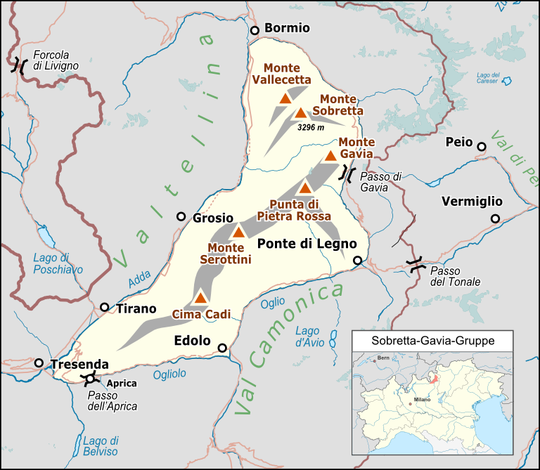 Sobretta-Gavia-Gruppe.